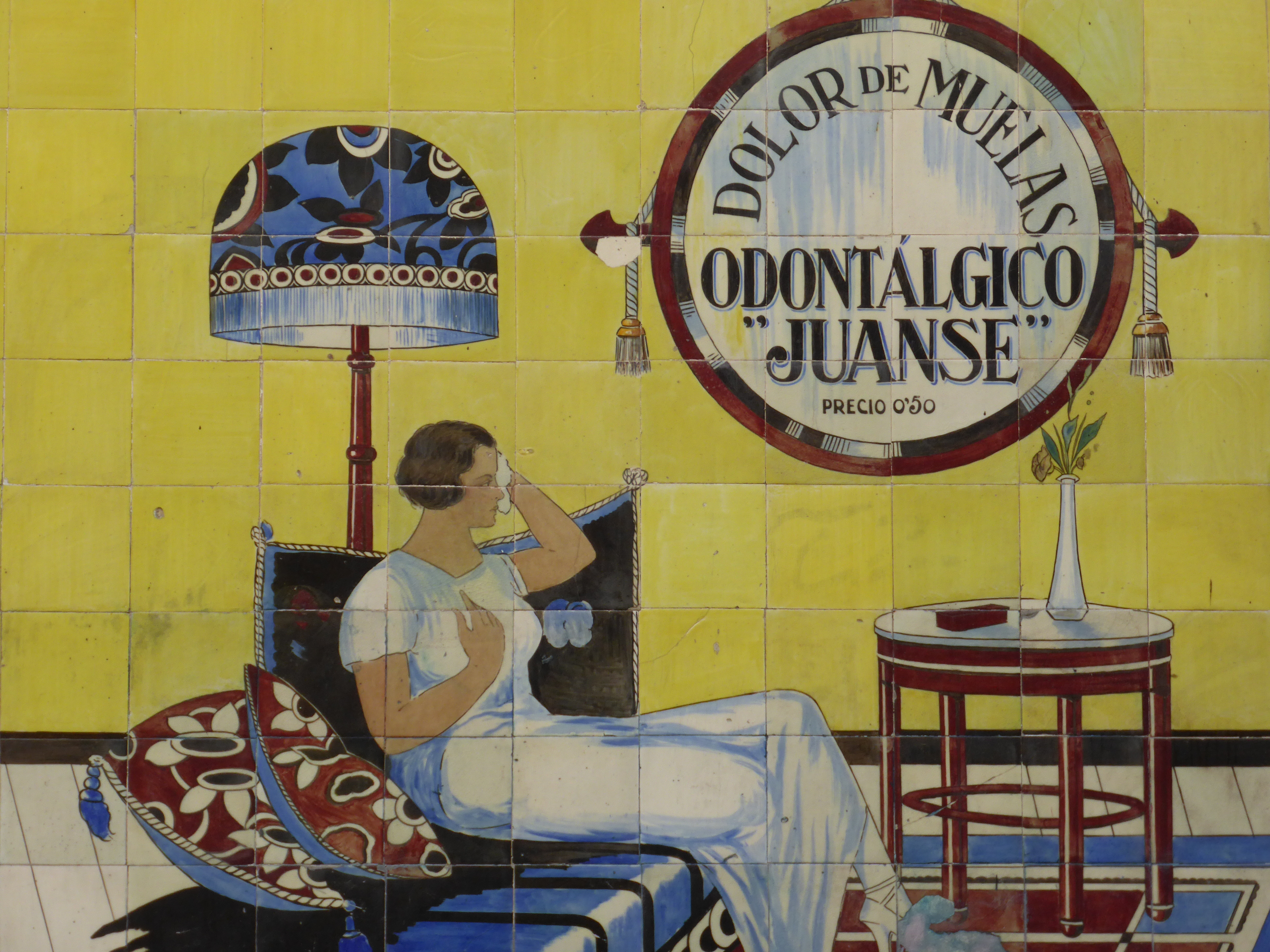 Un detalle de la publicidad exterior de la antigua farmacia "Juanse", situada en el barrio o zona de Malasaña, de Madrid (España). Dicha farmacia fue abierta en 1918, en la esquina de las calles San Vicente Ferrer y San Andrés. Todo el exterior está decorado con azulejos que anunciaban algunos de los productos farmacéuticos que vendían. Esta farmacia tenía laboratorio propio. En este caso, el producto anunciado era contra el dolor de dientes y muelas.